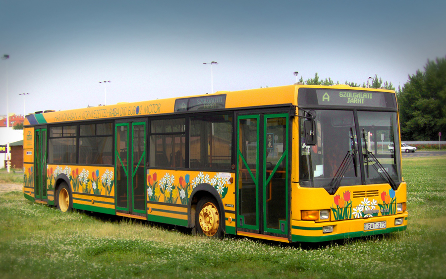 Ikarus 412.02 az első magyarországi példány (Győr)